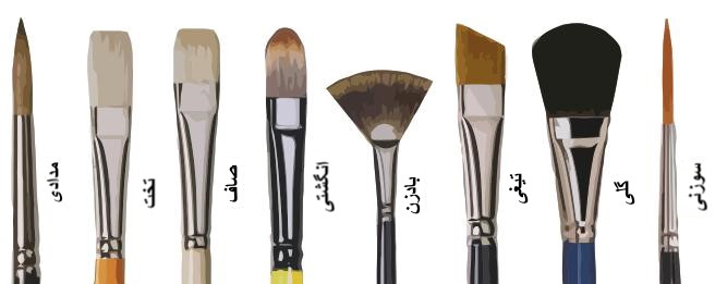 Types of brushes